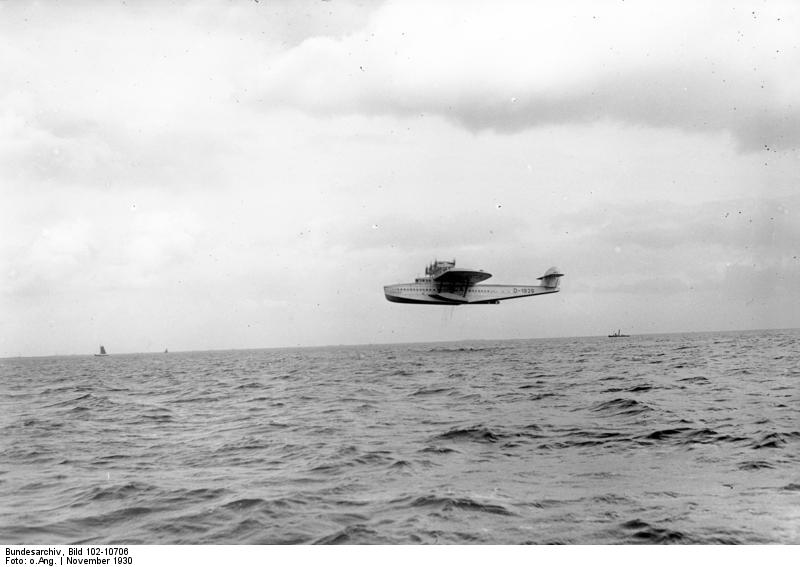 Der grandiose Flug der "Do X" über den Kanal von Amsterdam nach England! Original-Aufnahme vom Fluge der "Do X" über den Kanal nach England.